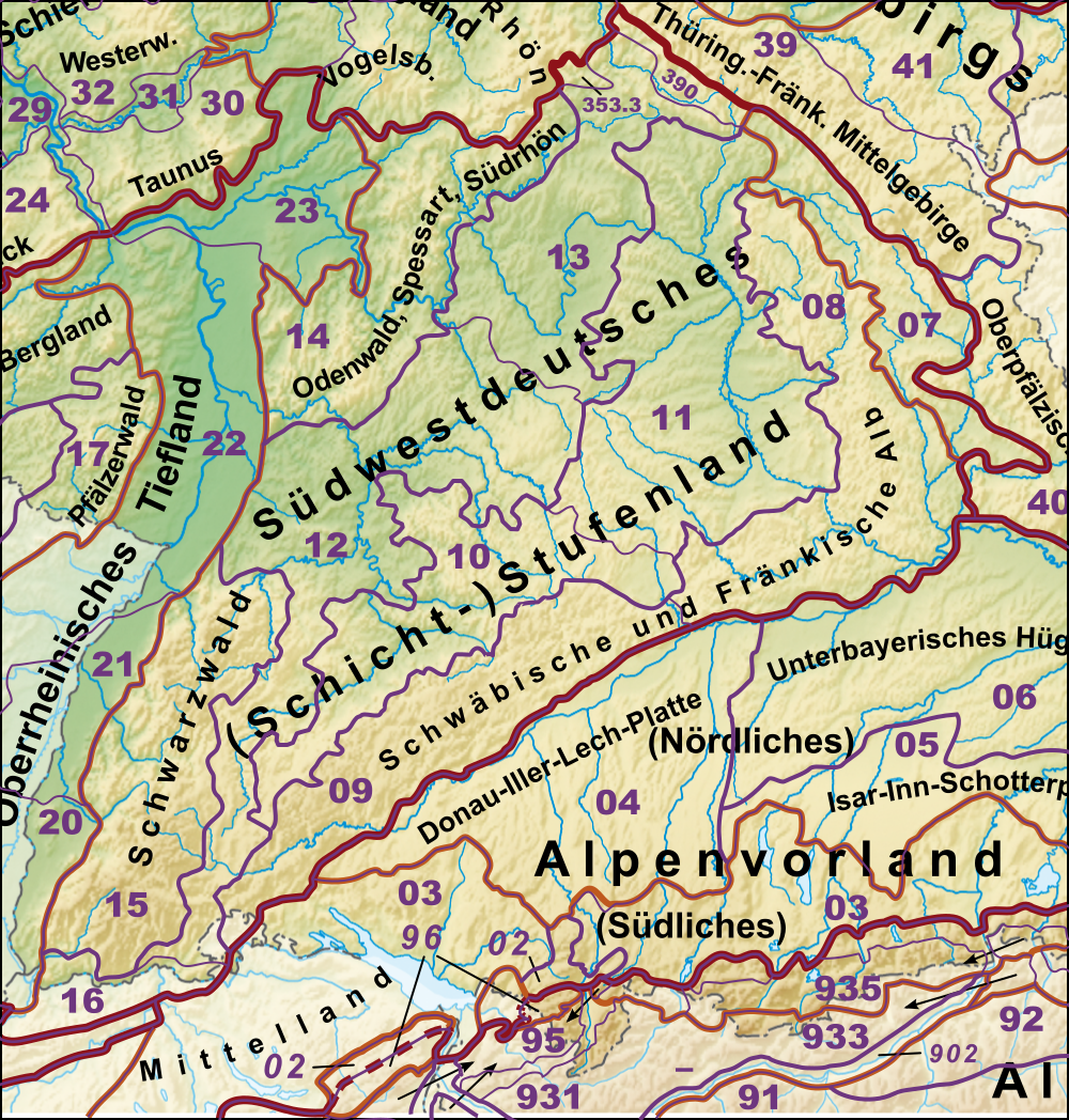 Oberrheinisches Tiefland und Haupteinheitengruppen des Südwestdeutschen Stufenlandes